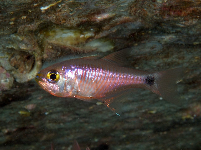 スミツキアトヒキテンジクダイ Archamia fucata